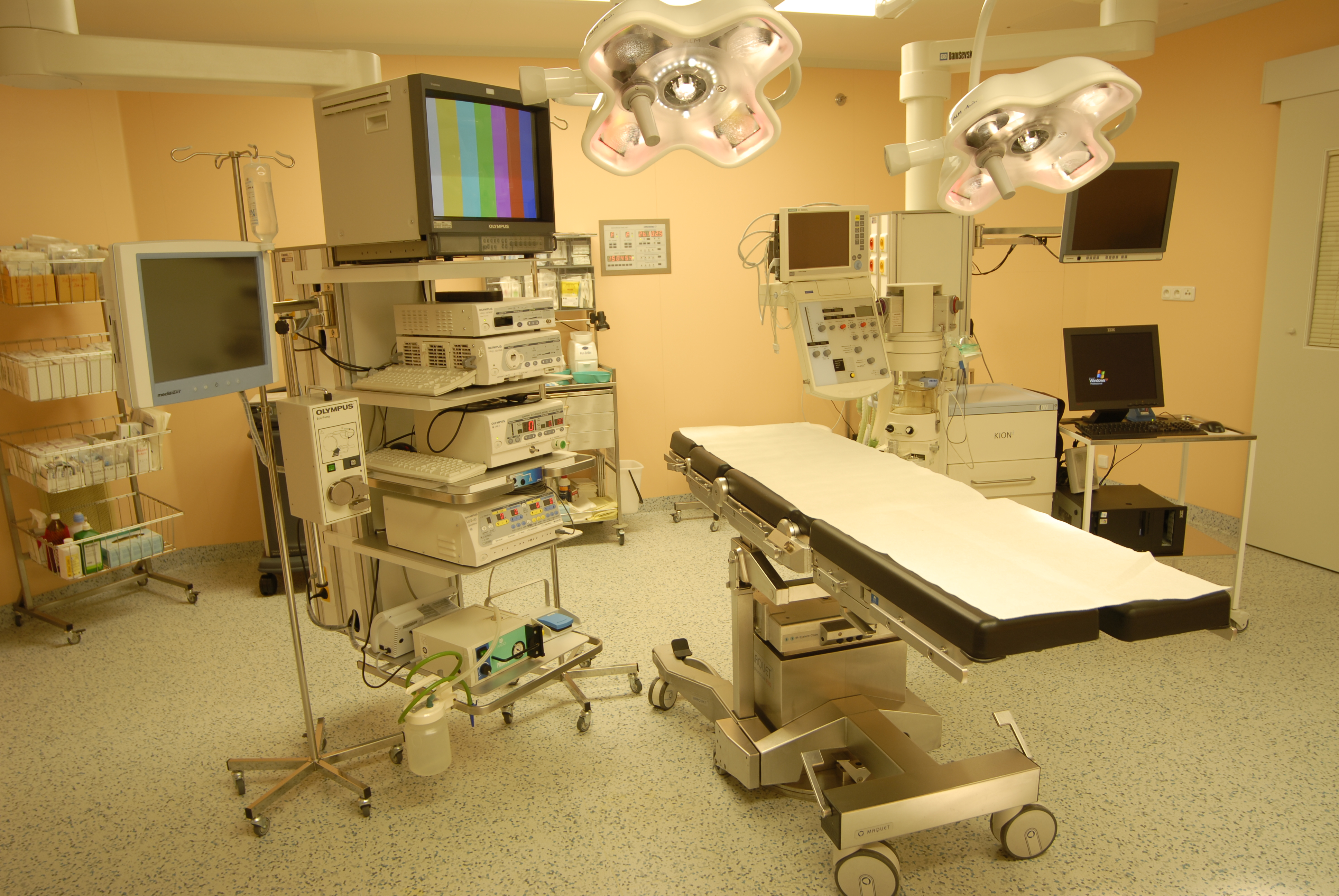 ilustrační foto sál